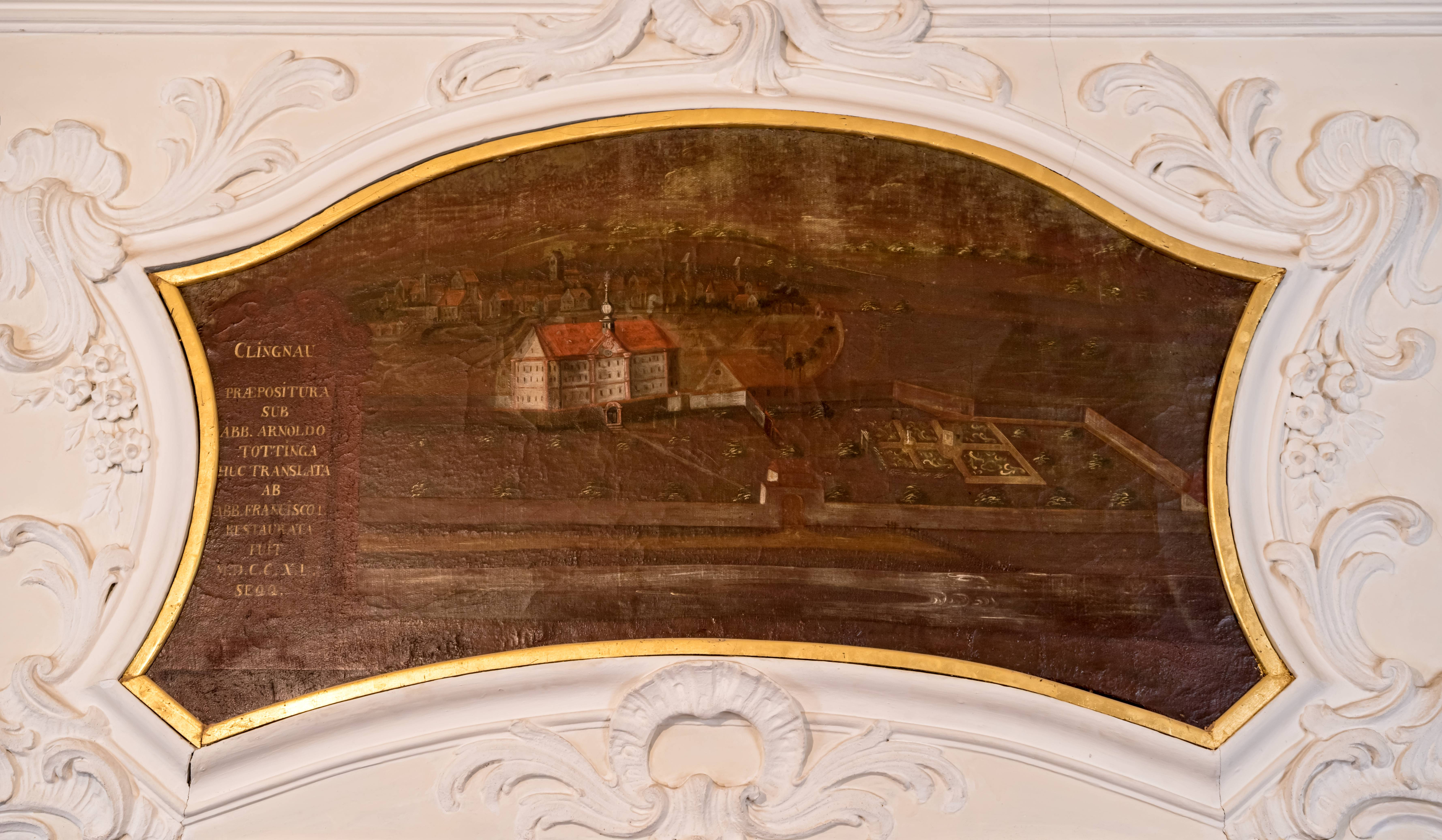 Bilder aus dem Schloß Bürgeln Hier Bilder von den Supraporten im ersten Stock des Schloßes. Es sind Bilder der Probsteien des Kloster St. Blasien und einige Füllbilder in einem später erstellten Flügel CLINGNAU PRAEPOSITURA SUB TOTTINGA HUC TRANSLATA AB ABB. FRANCISCOL. FUIT M.D.C.C.X.L. SEQQ.